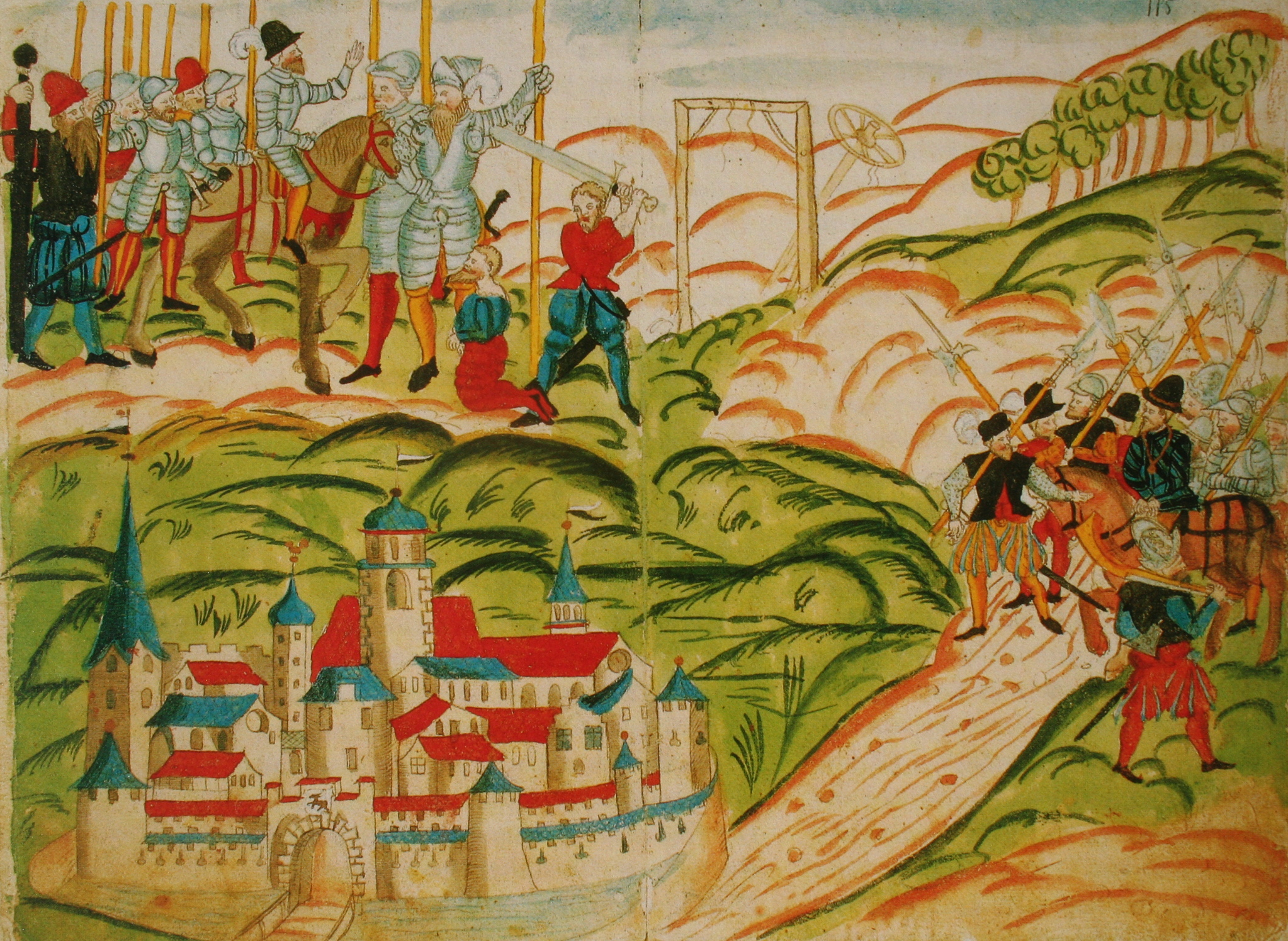 Fähnlilupf und Strafgericht vom März 1572: Hinrichtung des Johann von Planta in Chur. Kolorierte Federzeichnung aus der Zürcher «Wickiana»